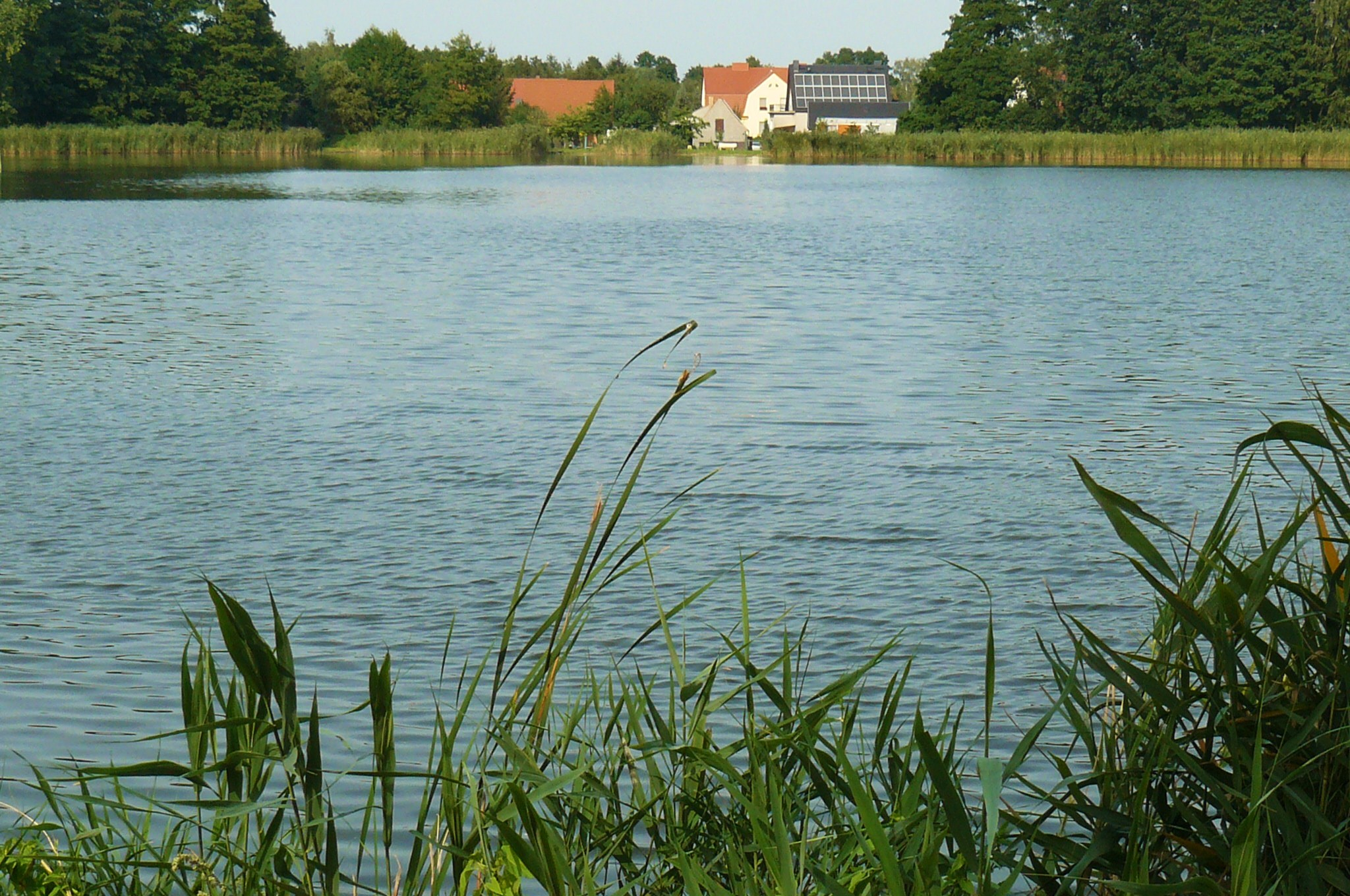 Stawy rybne w Peitz.